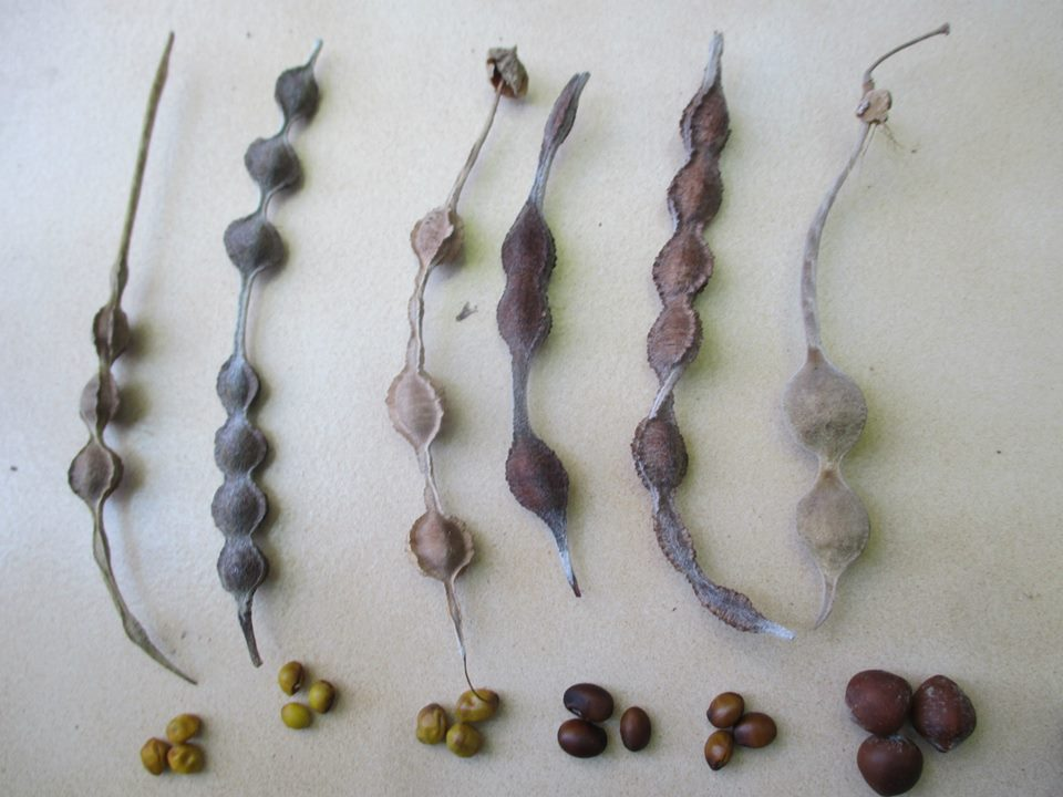 Diferentes especies de Sophoras que viven o cultivan en Chile.